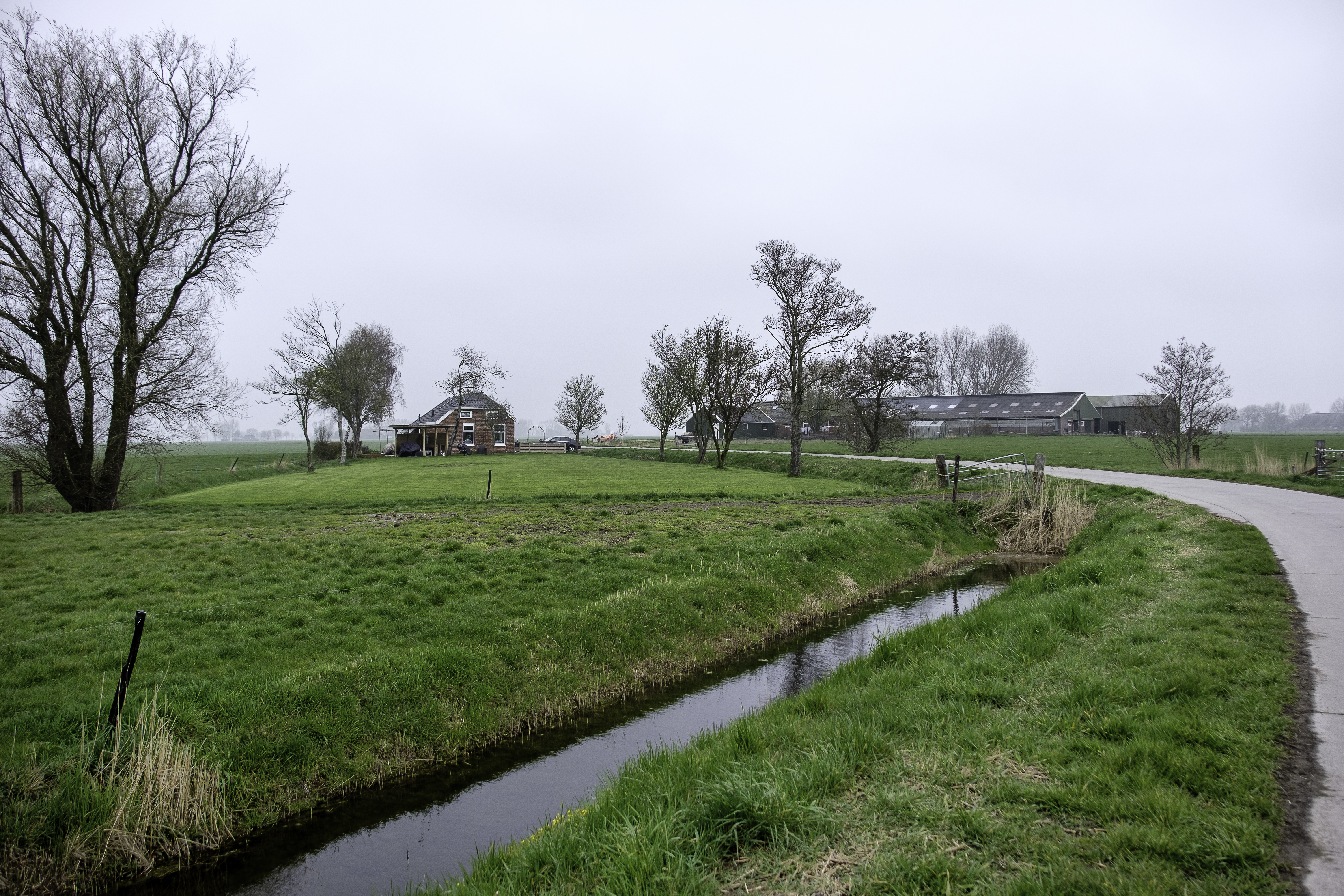 Deel van het wierderestant van Wierhuizen